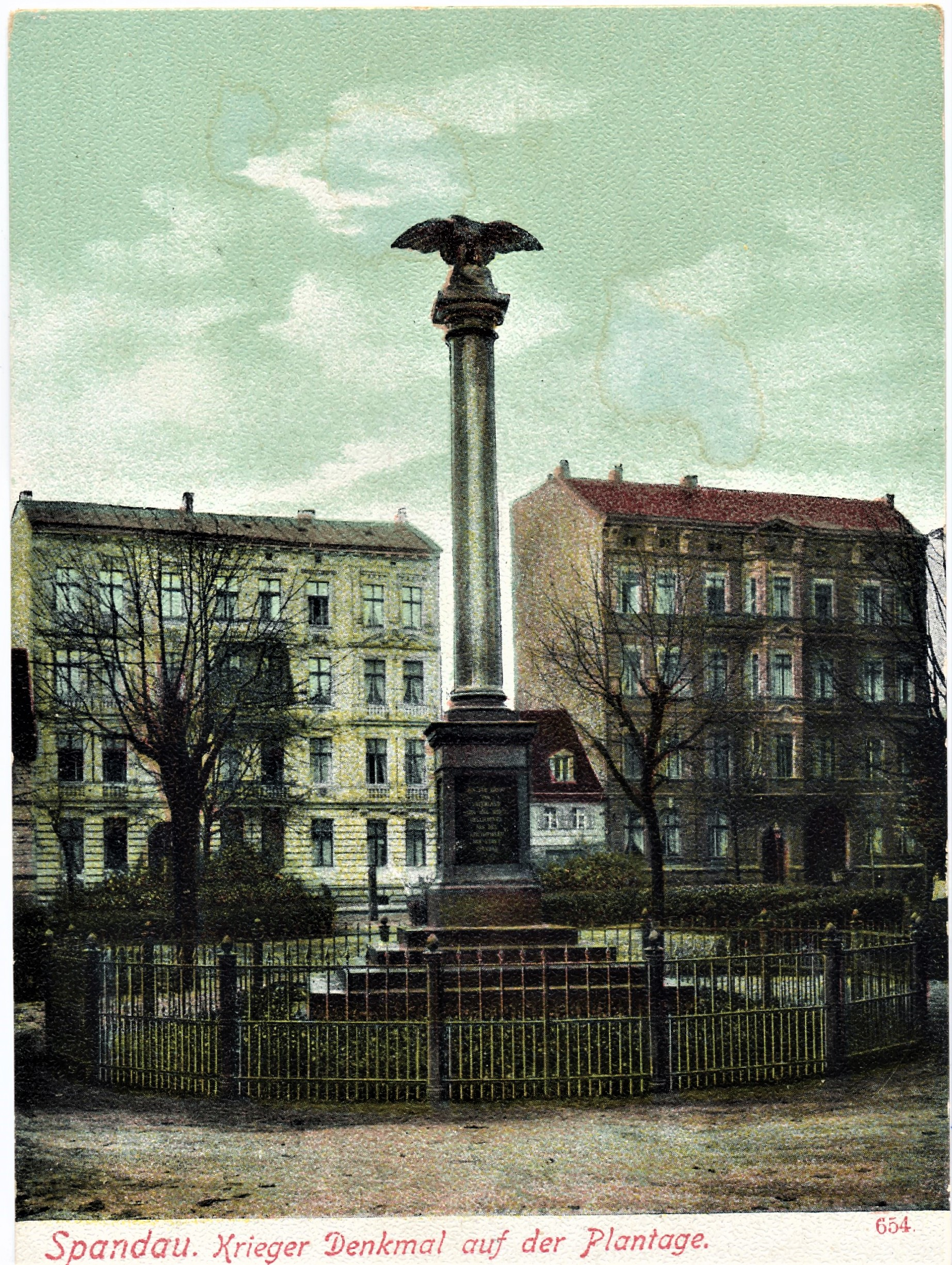 Die Ansichtskarte zeigt die Adlersäule für die im Deutsch-Dänischen und im Deutsch-Französischen Krieg gefallenen Spandauer Bürger. Sie suand in Spandau auf dem Stresow, Plantage - im Zentrum des Platzes. Das Bild zeigt den Zustand der Plantage-Siedlung um 1900.